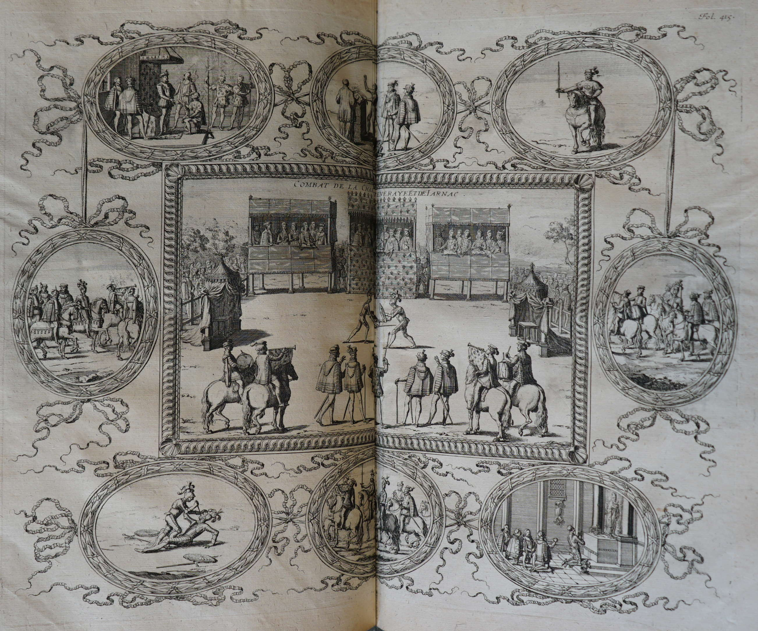 extrait du livre de Vulson ː "le théâtre d'honneur...".